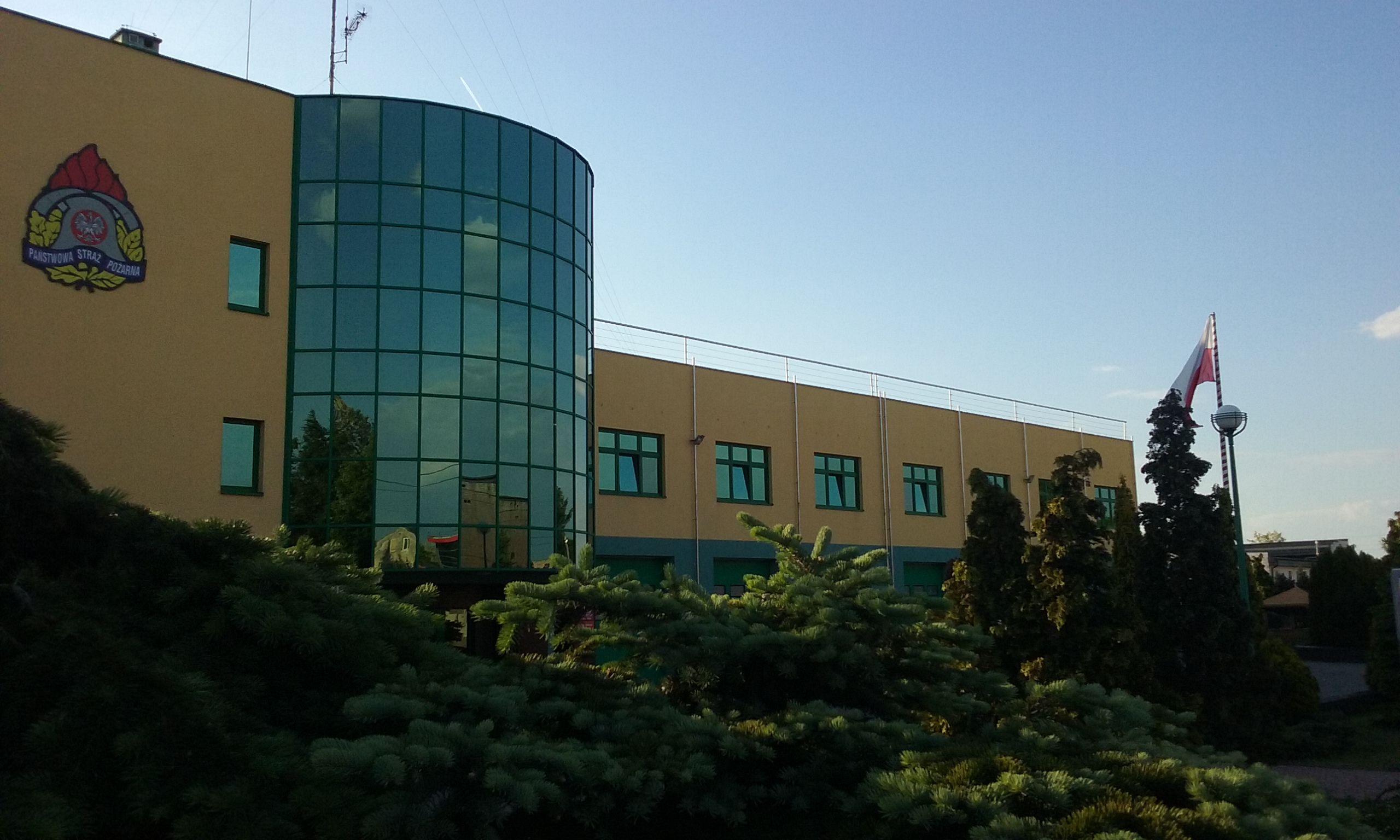 Komedna Powiatowa Państwowej Straży Pożarnej w Tomaszowie Mazowieckim, przy ulicy Warszawskiej 105